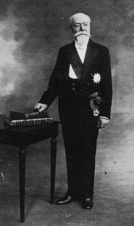 Portrait de Paul Doumer à l'Elysée. Version recadrée : File:Paul Doumer crop.jpg